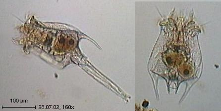 Bei der abgebildeten Rädertierart handelt es sich um einen Vertreter der Gattung Brachionus, genauer Brachionus quadridentatus.